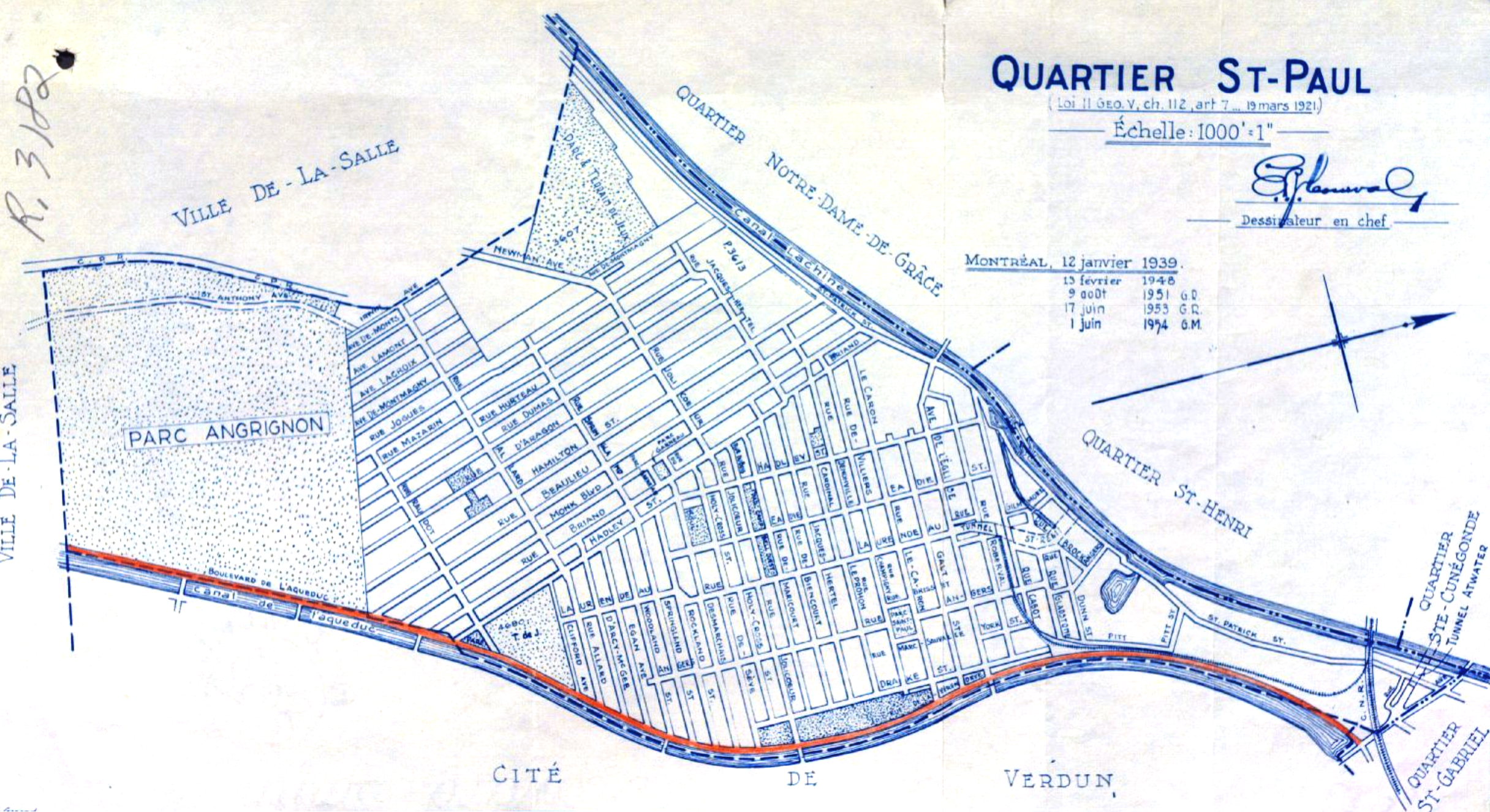 Carte du quartier Saint-Paul. Tracée en rouge, la voie de circulation qui longe le canal de l'aqueduc porte en partie le nom de boulevard de l'Aqueduc et boulevard De La Vérendrye.